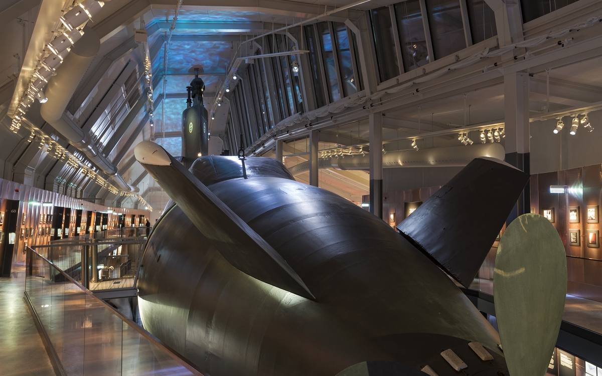 Den svenska ubåten HMS Neptun (Nep), i ubåtshallen på Marinmuseum i Karlskrona.